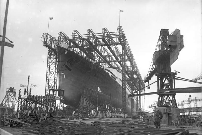 Der feierliche Stapellauf des größten Ozeandampfers "Bremen" fand unter Anwesenheit des Reichspräsidenten von Hindenburg in Bremen statt. Blick auf Deutschland größten Ozeandampfer "Bremen" in den Helligen auf der Weft vor dem Stapellauf.